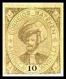 Фантастическая марка Батекена, Лиссабон, 1897 год.